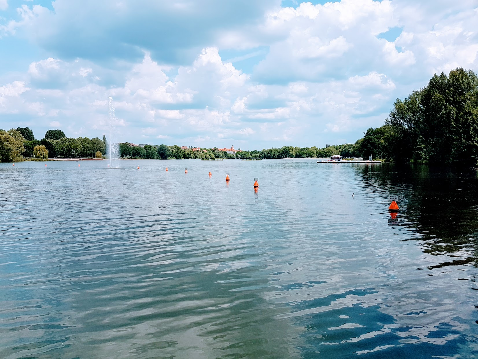 Wöhrder See